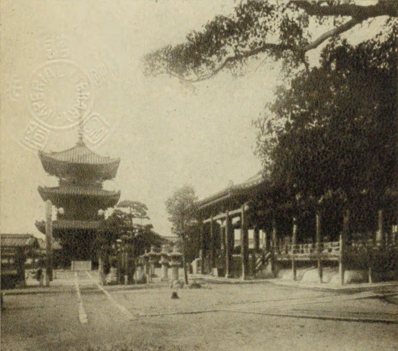 日本の国立国会デジタルコレクションで公開されている『日本案内記・近畿編下巻』（発行：兵庫電気軌道会社）の63目コマに掲載されている「兵庫停留所」